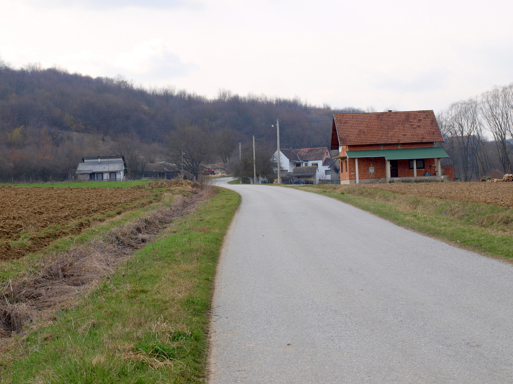 Ulaz u selo Zdenci, Brodsko-posavska županija.